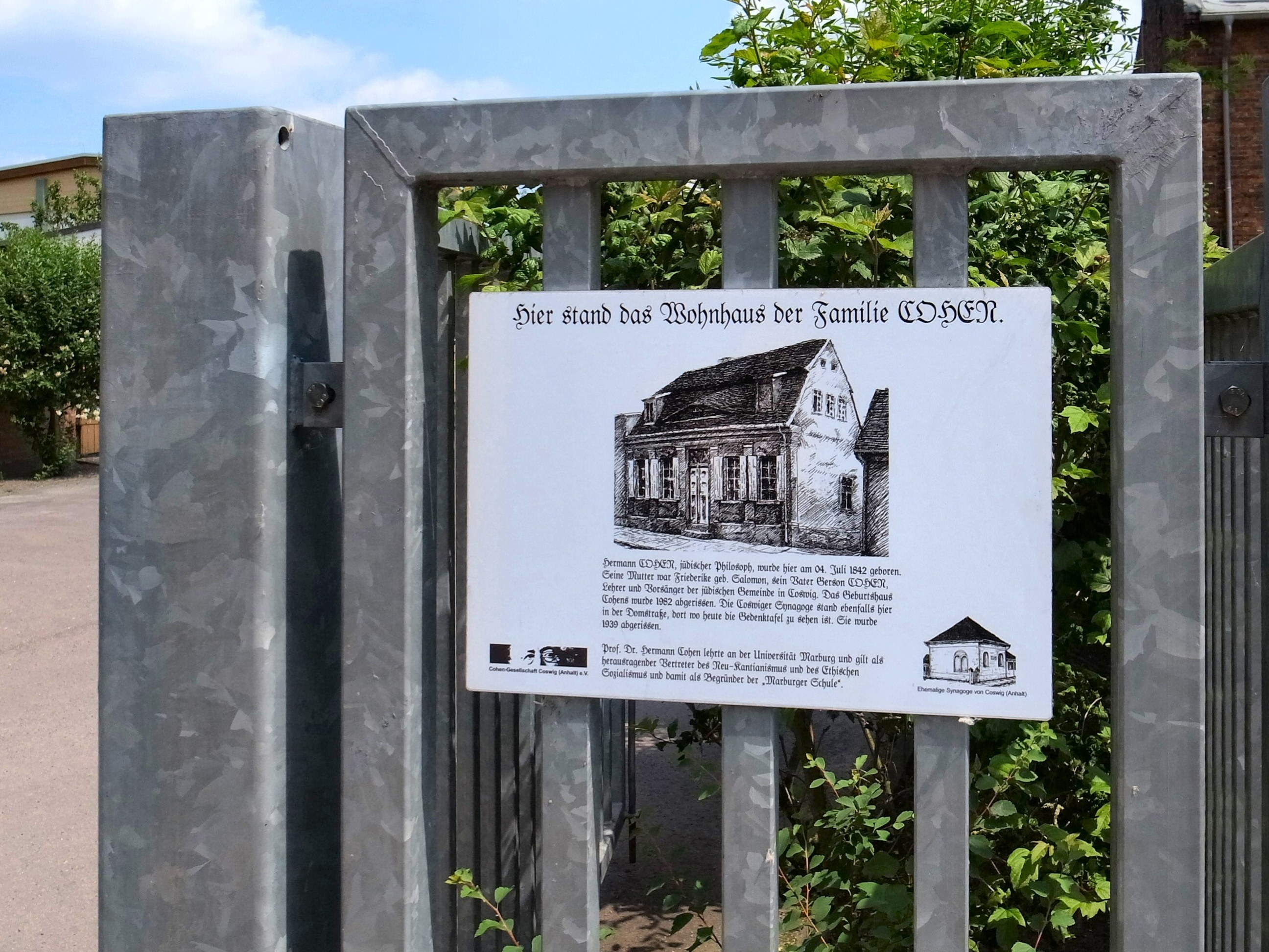 Coswig (Anhalt), Gedenktafel am nicht mehr vorhandenen Geburtshaus von Hermann Cohen